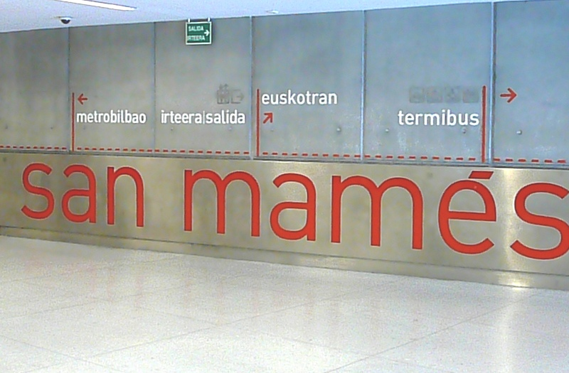 San Mames geltokiko ataria / vestíbulo de la estación de San Mamés